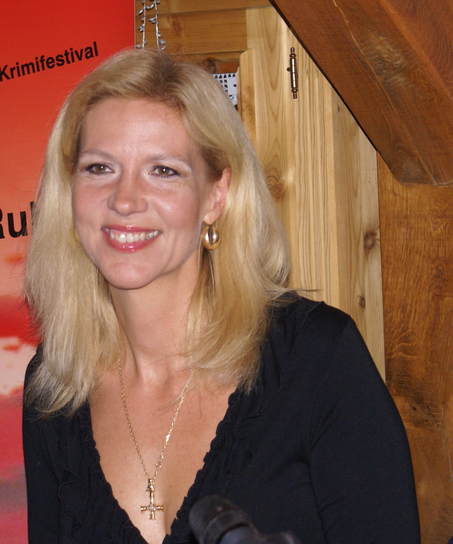 Liza Marklund bei einer Veranstaltung im Rahmen des Krimifestivals Mord am Hellweg in Werne am 1. November 2008